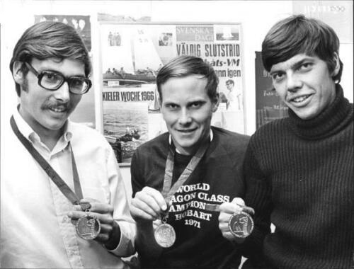 The brothers, Peter Sundelin, Jorgen Sundelin and Ulf Sundelin